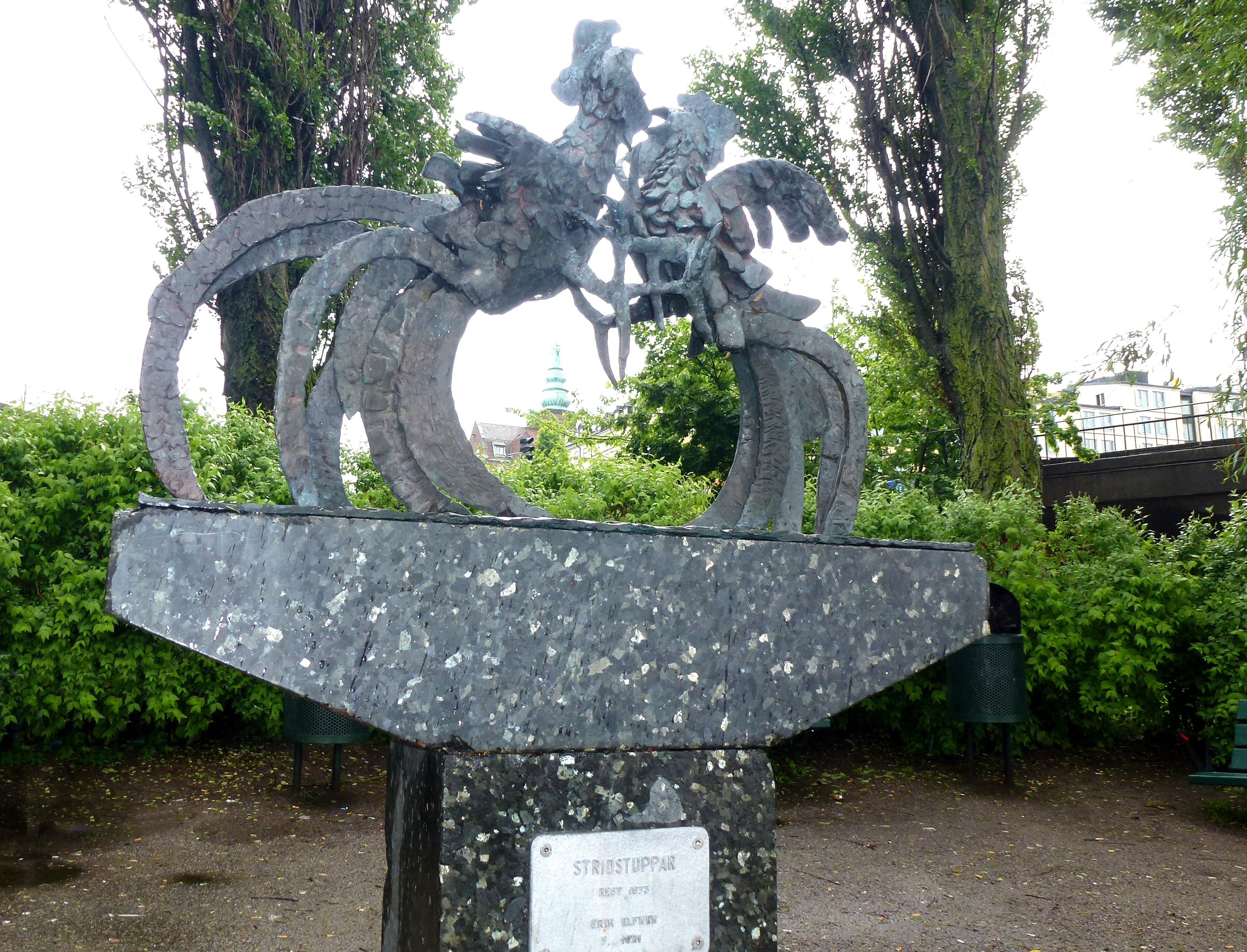 Skulptur "Stridstuppar" vid Slussen, Stockholm